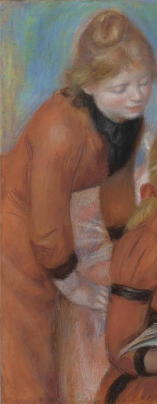 La Lecture (pormenor)